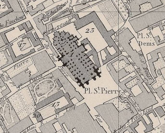 plan de 1839 autour de la Cathédrale Saint-Pierre-et-Saint-Paul de Troyes